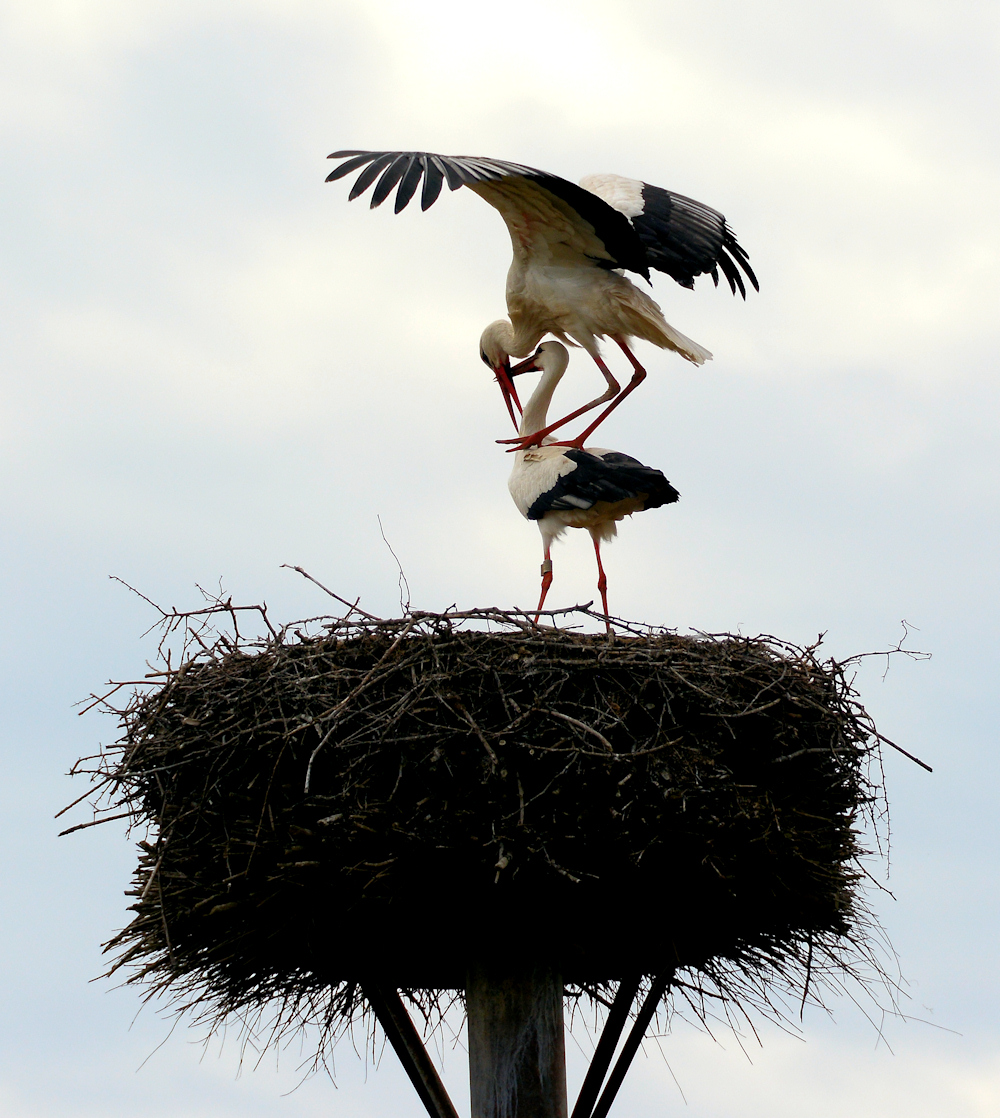 Parende ooievaars op hun nest.